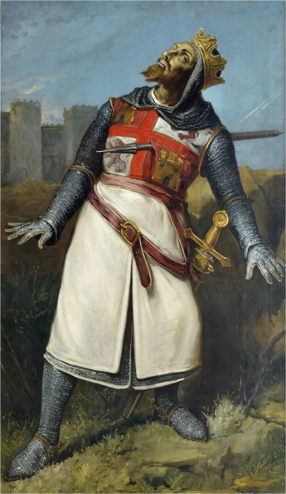 Retrato imaginario del rey Sancho II de Castilla (c.1038-1072). Fue hijo del rey Fernando I de León y de la reina Sancha de León. Consiguió reunificar la herencia de su padre, Fernando I, aunque falleció poco después, en 1072, mientras asediaba la ciudad de Zamora, que pertenecía a su hermana, la infanta Urraca de Zamora. Todos los reinos de Sancho II fueron heredados por su hermano, Alfonso VI de León.